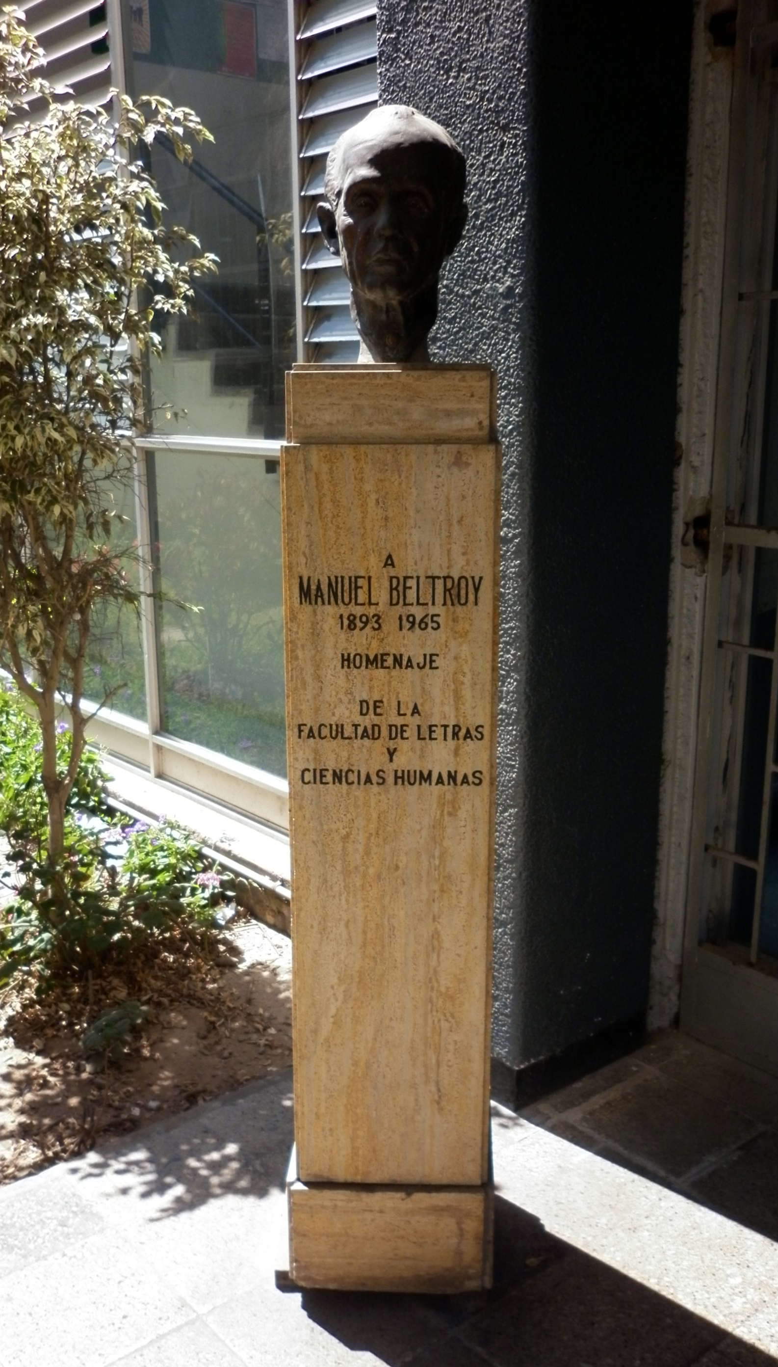 Monumento de Manuel Beltroy en el interior de la Facultad de Letras y Ciencias Humanas de la Universidad Nacional Mayor de San Marcos